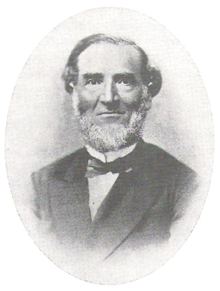 Markus G. Dreifus (1812-1877), jüdischer Lehrer und Kämpfer für die Emanzipation